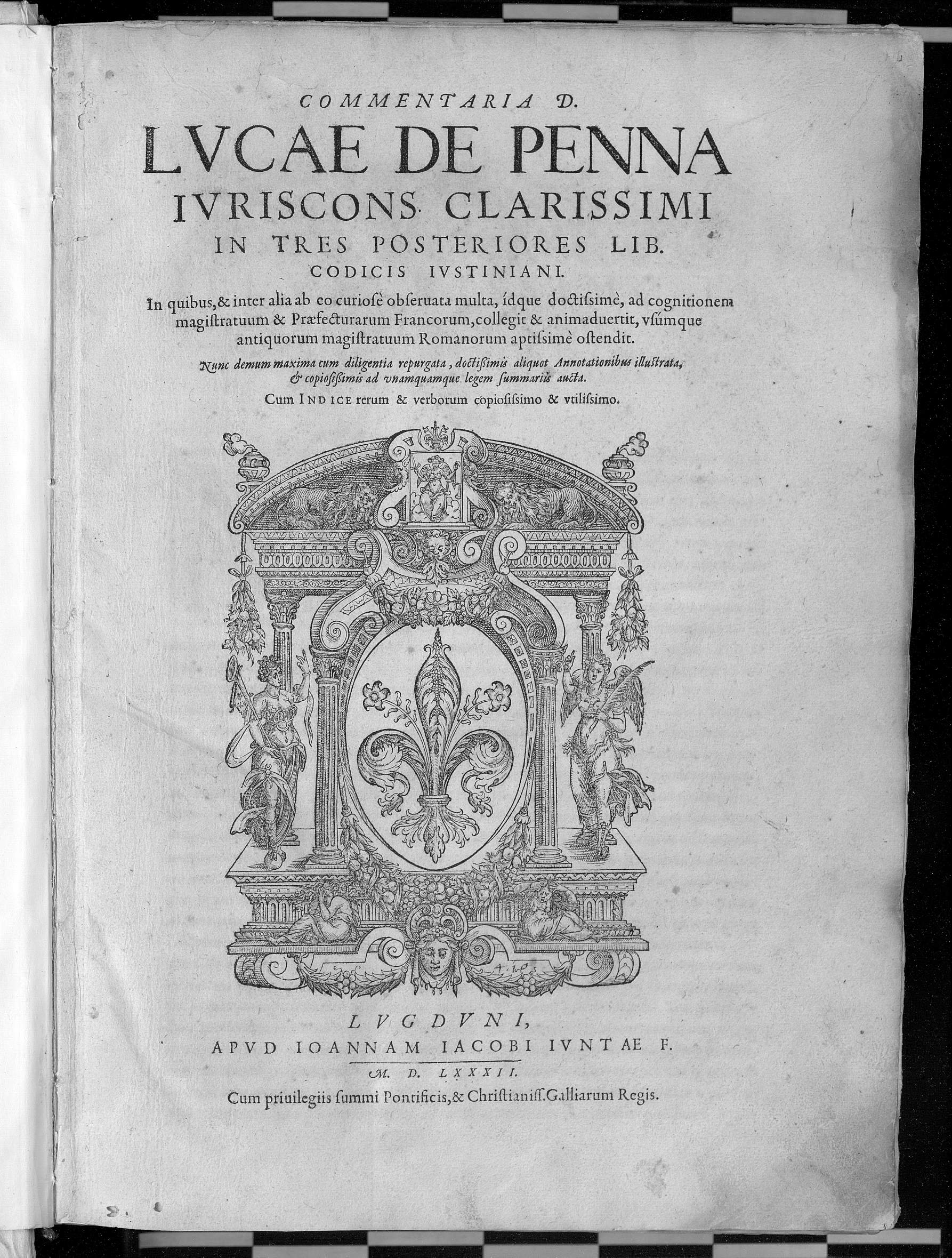 Frontespizio